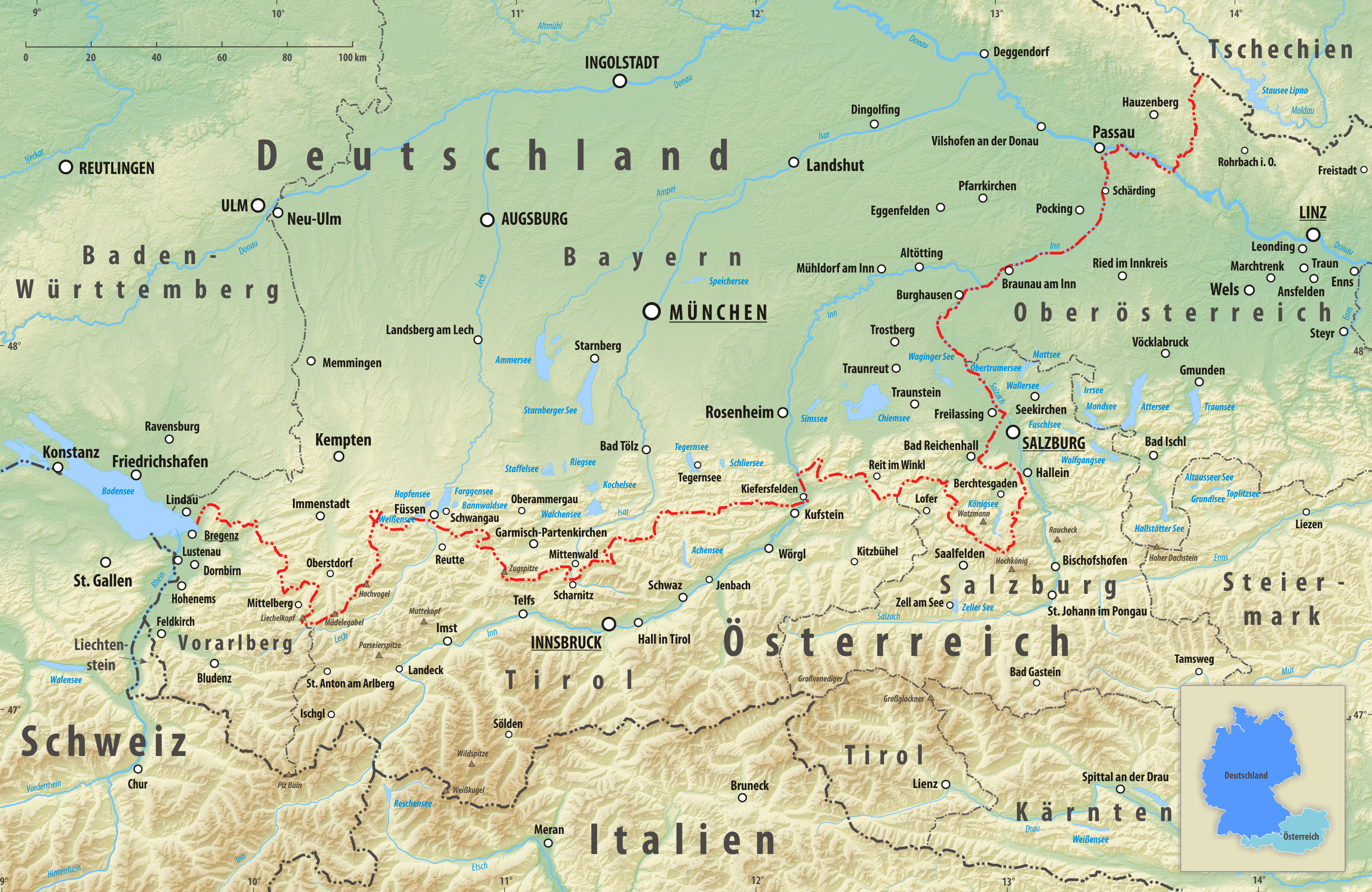 Reliefkarte des Grenzverlaufes zwischen Deutschland und Österreich Topographischer Hintergrund: NASA Shuttle Radar Topography Mission (public domain). SRTM3 v.2.